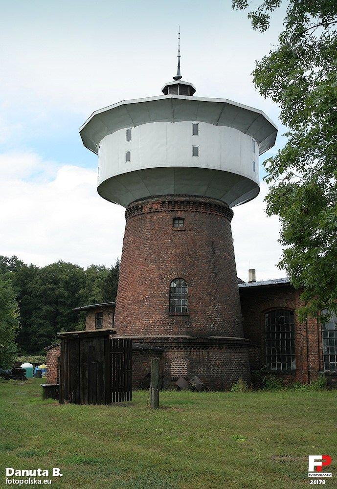 Wieża wodna przylegająca do budynku parowozowni.